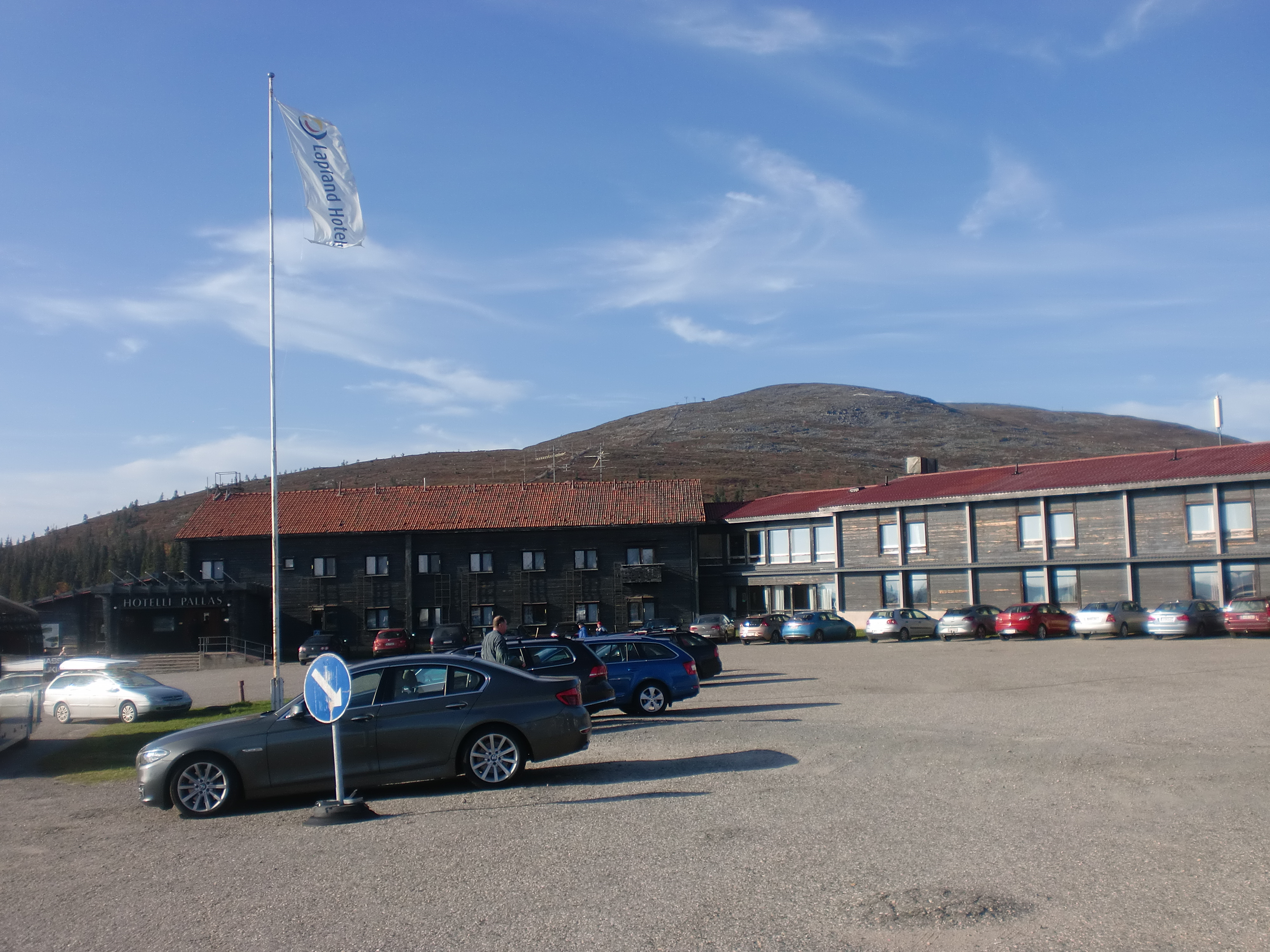 Pallas; hotelli ja kulttuuriympäristö Muoniossa